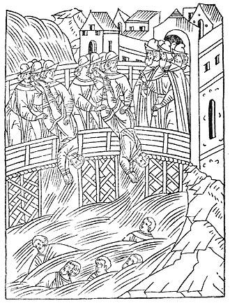 Казнь стригольников в Новгороде в 1375 г. Миниатюра Никоновской лицевой летописи, XVI в.